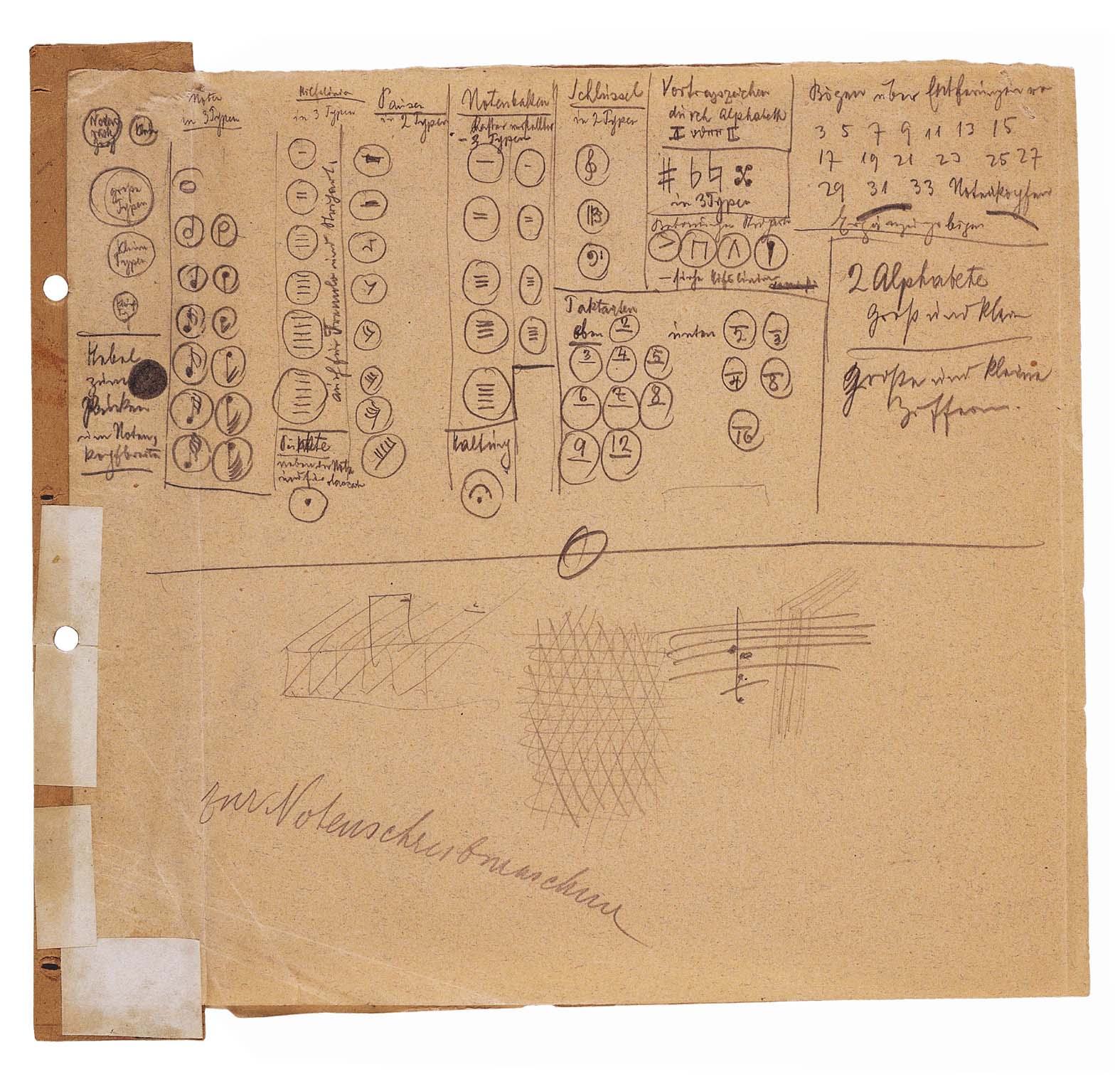 Entwurf einer Notenschreibmaschine von Arnold Schönberg, 1909